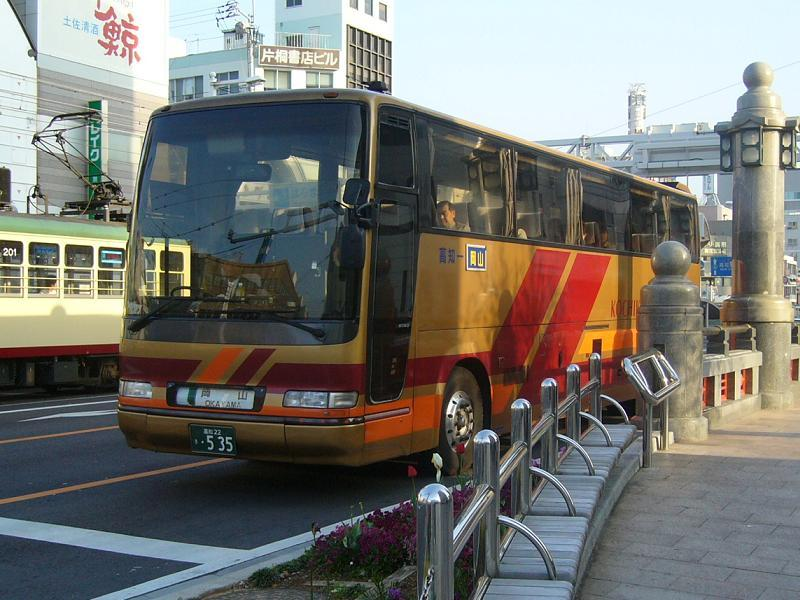 登録番号 高知22き535 高知県交通所属 龍馬エクスプレス号用 2006年4月8日 はりまや橋にて撮影 撮影者 Tokatsu kokubu